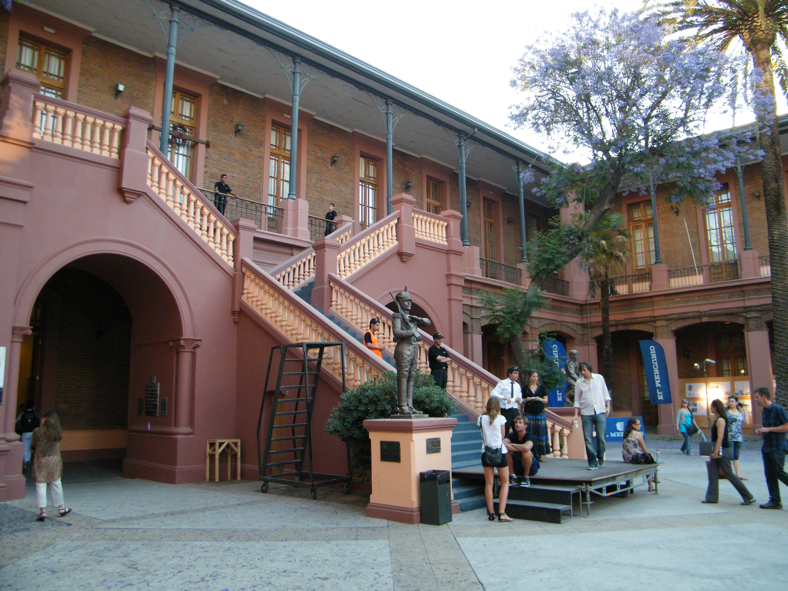 Patio de la antigua escuela militar durante el desarrollo de la Bienal de Arquitectura 2008. This is a photo of a national monument in Chile: 213